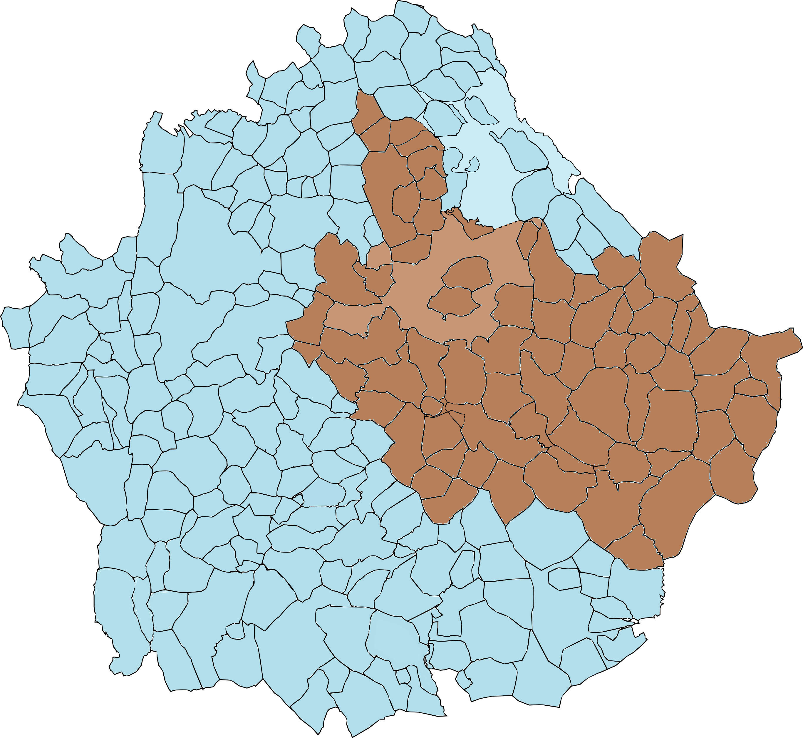 Comarca Serranía Media-Campichuelo y Serranía Baja